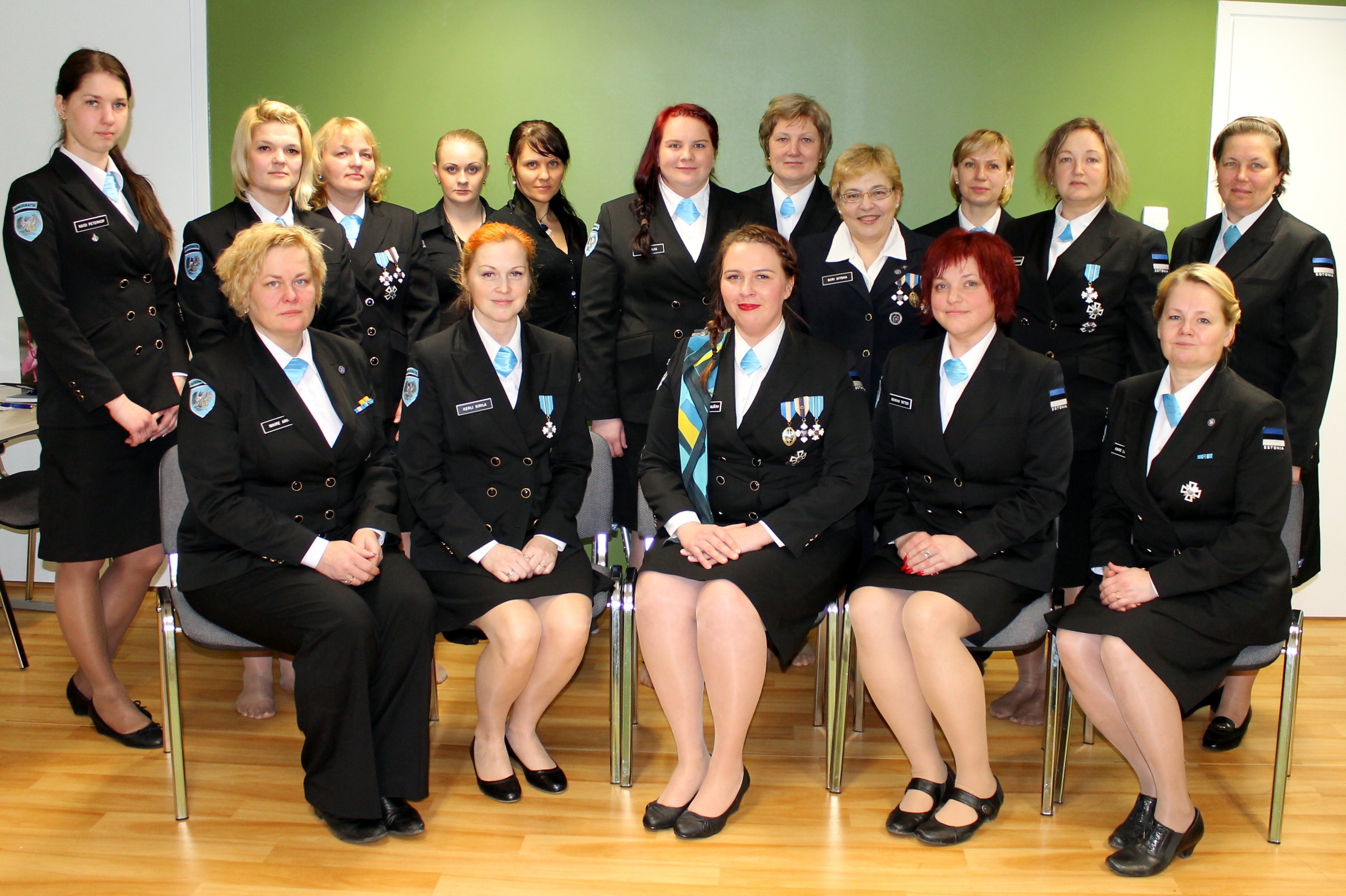 4.märtsil 2015 kogunes Koeru Üksikkompanii Kodus Järva ringkonnakogu. Valiti uus, juhatus, uus ringkonna esinaine.